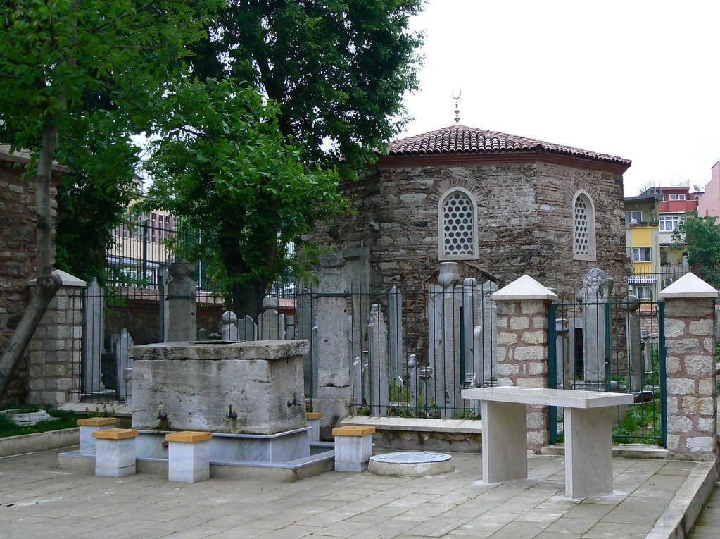 قبر حسین آغا